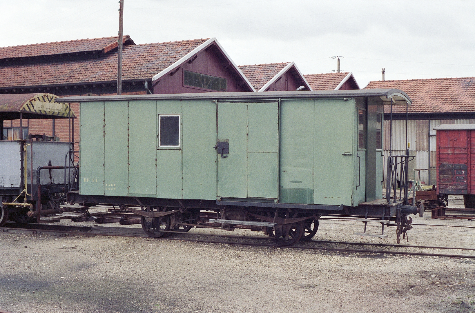 Le fourgon DF51 ex-POC construit en 1903 par Blanc-Misseron, au dépôt du chemin de fer du Blanc-Argent de Romorantin le 14 octobre 1989.